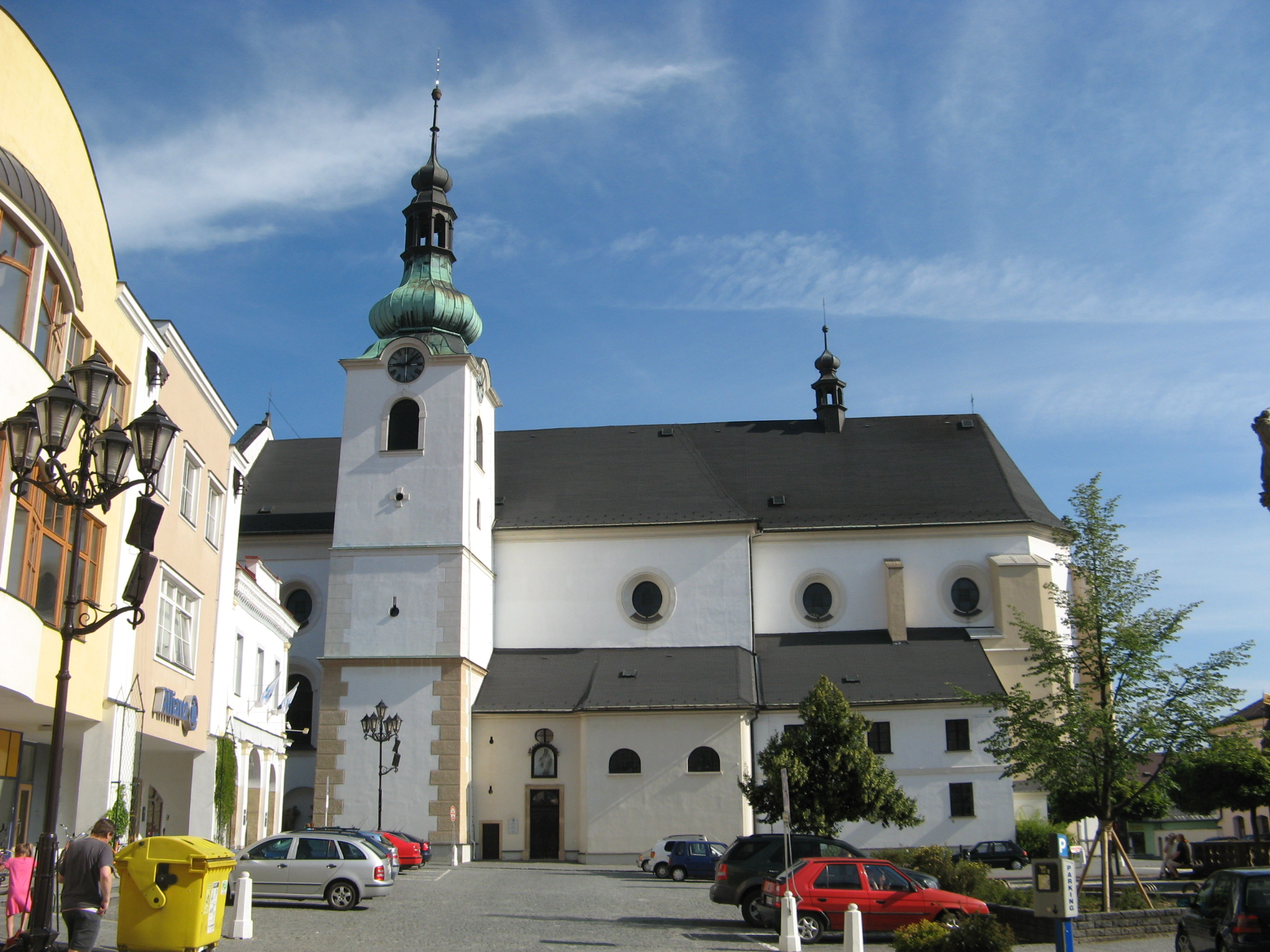 Kostel Navštívení Panny Marie (Svitavy), Czech Republic